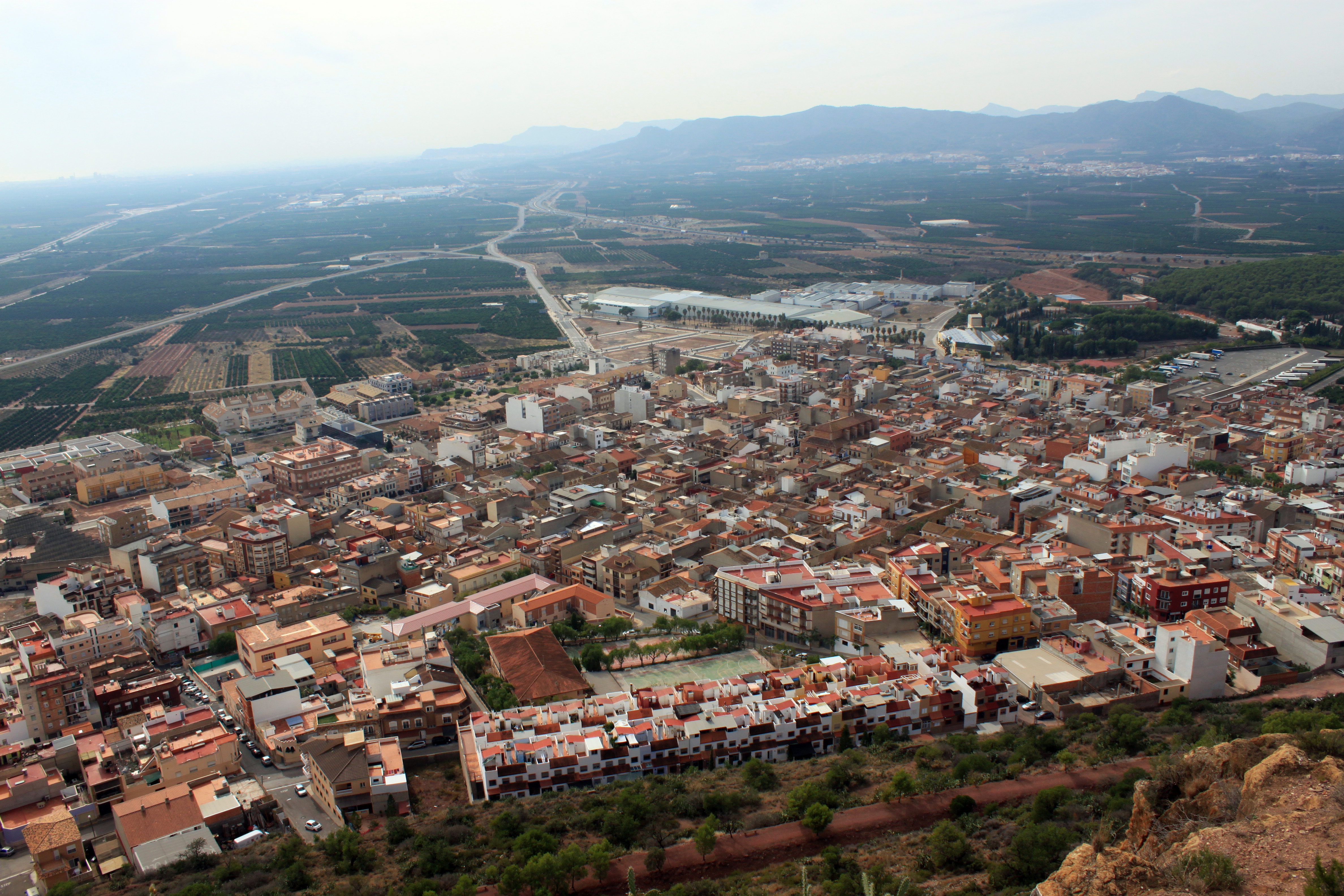 Vista de la localidad de Almenara desde el castillo. Provincia de Castellón, Comunidad Valenciana.